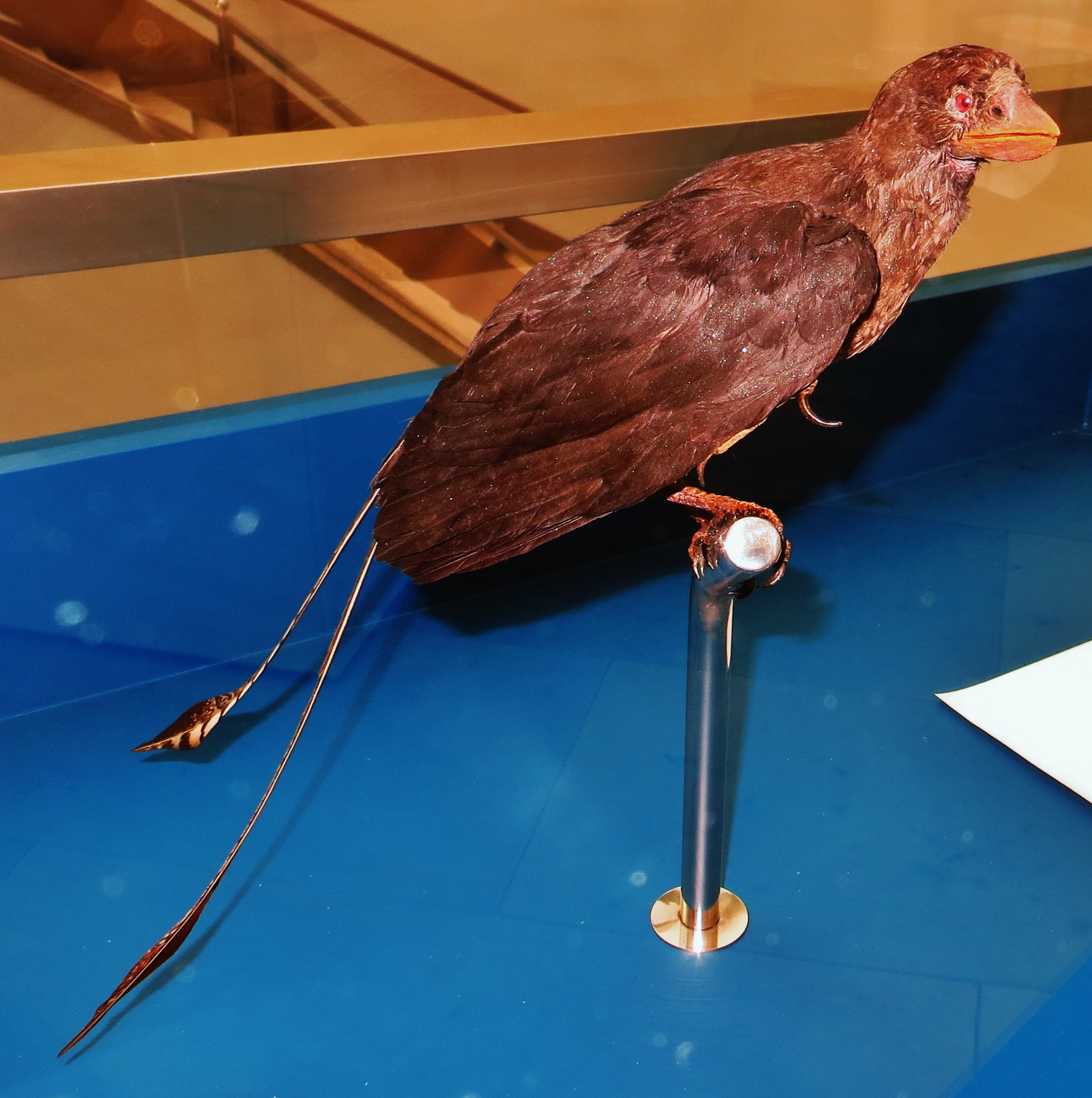 Fossil - Took the picture at Natural History Museum, Karlsruhe